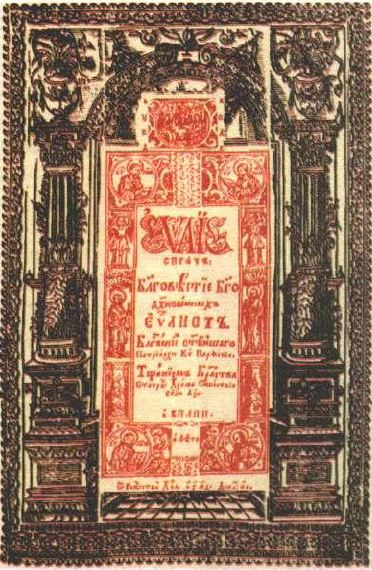 Віленская брацкая друкарня. Евангелле. Вільня, 1644